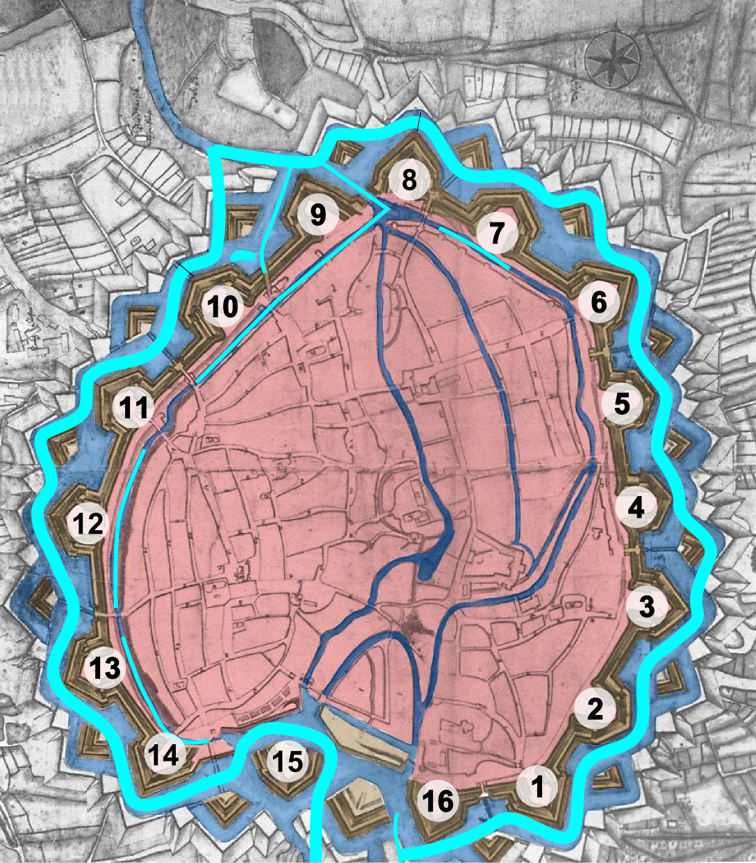 Okerumflut, basierend auf Braunschweig_1765.jpg mit Hervorhebung des heutigen Okerverlaufs und Nummerierung der Bastionen nach Schüpp, Die herzogliche Stadt bis zur beginnenden Industrialisierung entgegen dem Uhrzeigersinn und ohne Bauchwall-Bastion. Die Bastionen sind: 1 Ägidien (Windmühlenberg) 2 Wilhelm (Löwenwall) 3 Magni 4 Ulrich 5 Anton 6 Fallersleber 7 August 8 Rudolf (Gaußberg) 9 Ludwig (Löbbeckes Garten) 10 Kaiser 11 Elisabeth 12 Carl 13 Ferdinand 14 Eugen 15 "detachiert" 16 Luise .